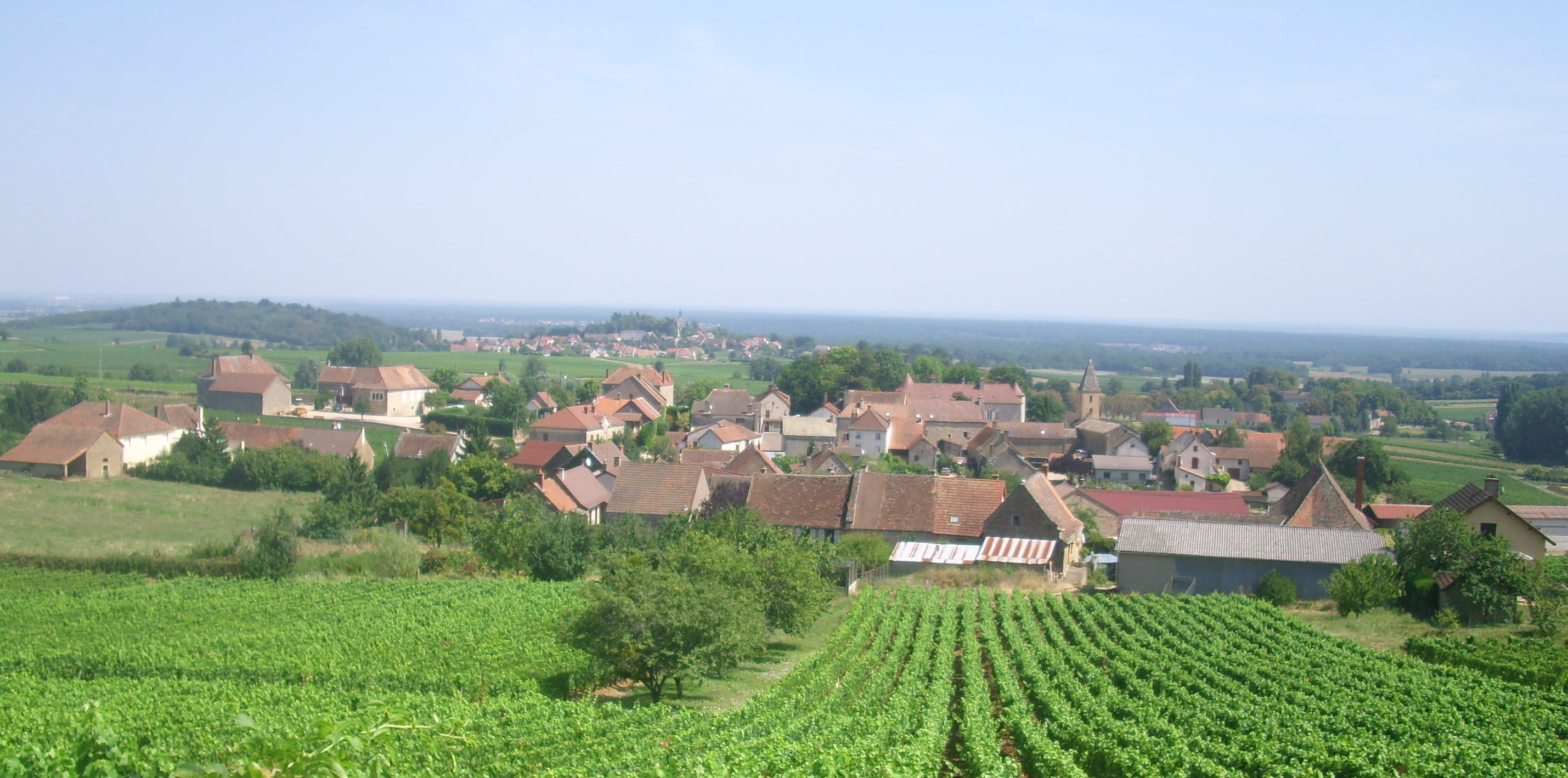 Vue d'une partie du village de Saint-Vallerin (71)